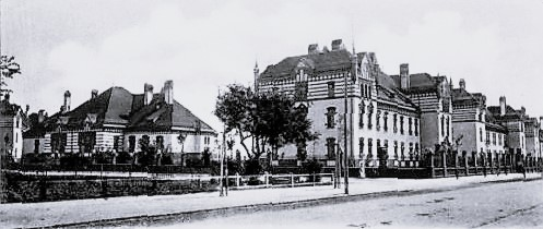 Historische Postkarte von Lübeck aus dem Verlag: Reinicke & Rubin, Magdeburg. ehem. Kaserne des II. Batls. des Infarterie-Regiments "Lübeck" (3. Hanseatisches) Nr. 162, im 3. Reich als Meesen-Kaserne benannt, gesehen gegenüber der Einmündung Scharnhorststraße in die Marlistraße; Stadtteil Marli, in Lübeck. Auf ihrem Hof fand der Staatsakt zum Tode v. Loßbergs statt.